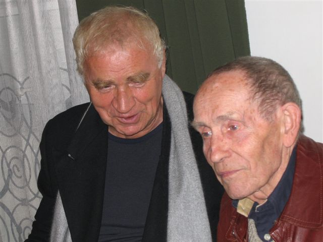 Janusz Głowacki (1938-2017), Polish writer and playwright and Tadeusz Konwicki (1926-2015), Polish writer